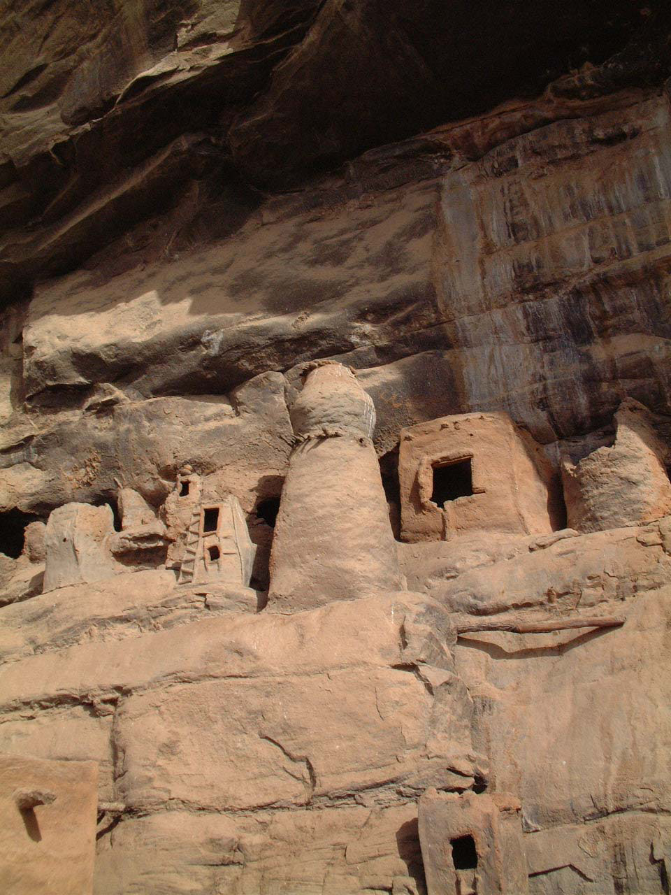 Auteur : Taguelmoust Habitats Tellem, dans la falaise à Tèli (Mali) Sous gfdl Taguelmoust janvier 2003